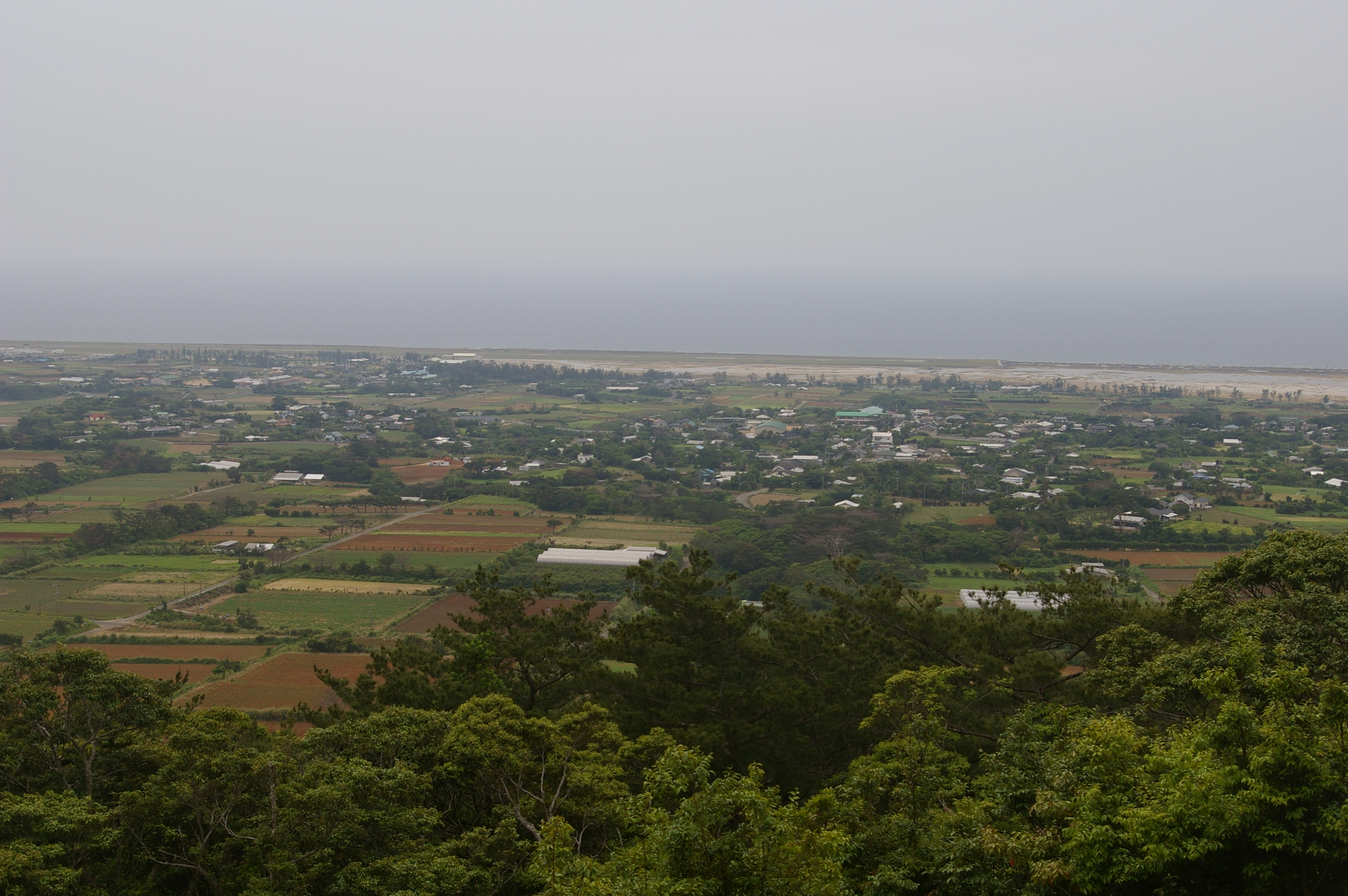 前野展望台より天城町域を望む